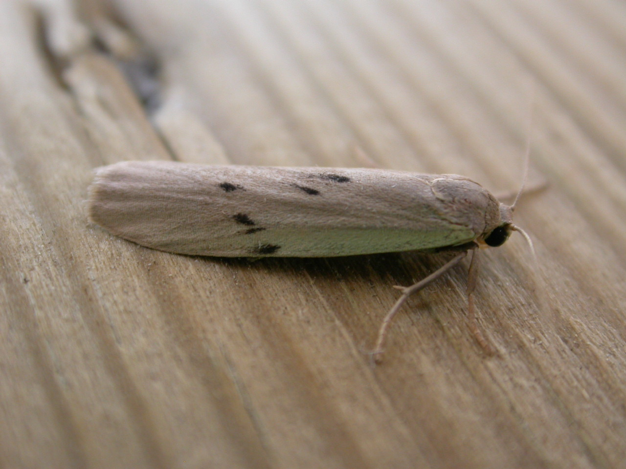 Pelosia muscerda, Gastes, Landes, SW France, 4/5 July 2003